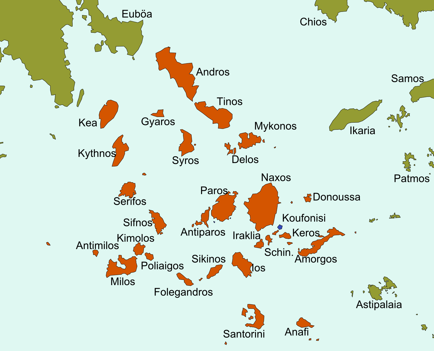 Lage der Insel Koufonisi in den Kykladen